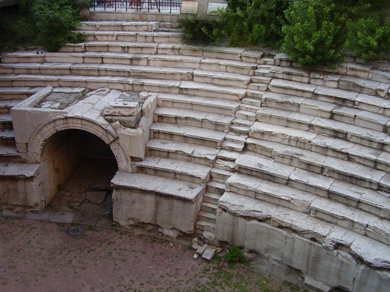 Teatro romano a Plovdiv, Bulgaria